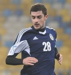 Резван Кочиш під час виступів за Говерлу